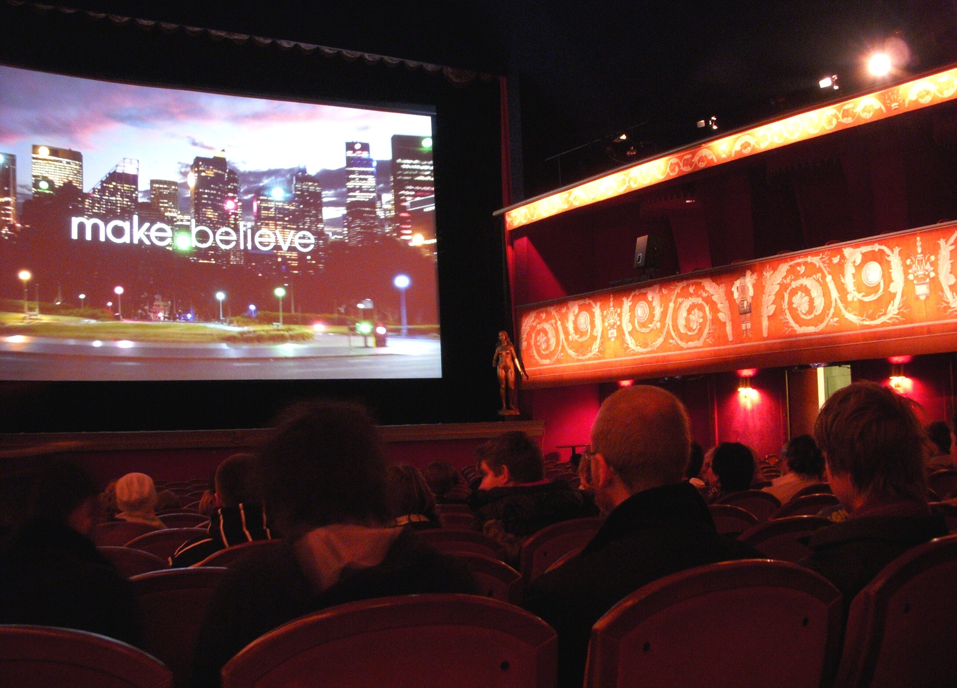 Biograf Skandia, Stockholm, salongen